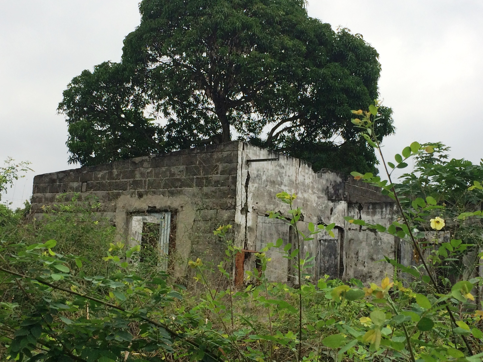 Une habitation à Mfilou non réhabilitée 20 ans après, au Congo, le 3 juin 2017. (VOA/Ngouela Ngoussou) Vingt ans après le 5 juin 1997, les populations gardent encore des souvenirs, alors que le pouvoir appelle à tout oublier.